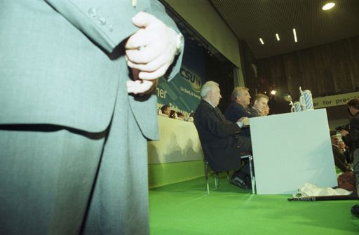 Politischer Aschermittwoch